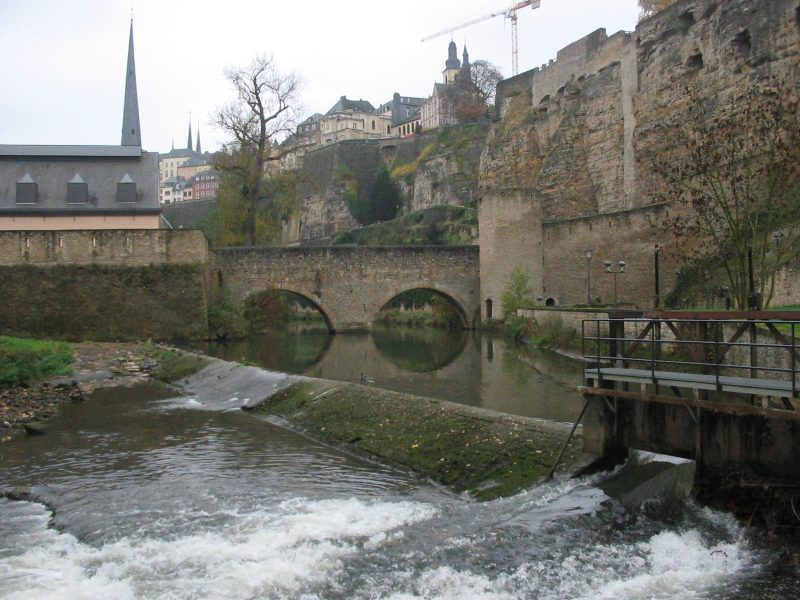 Die Alzette in Luxemburg